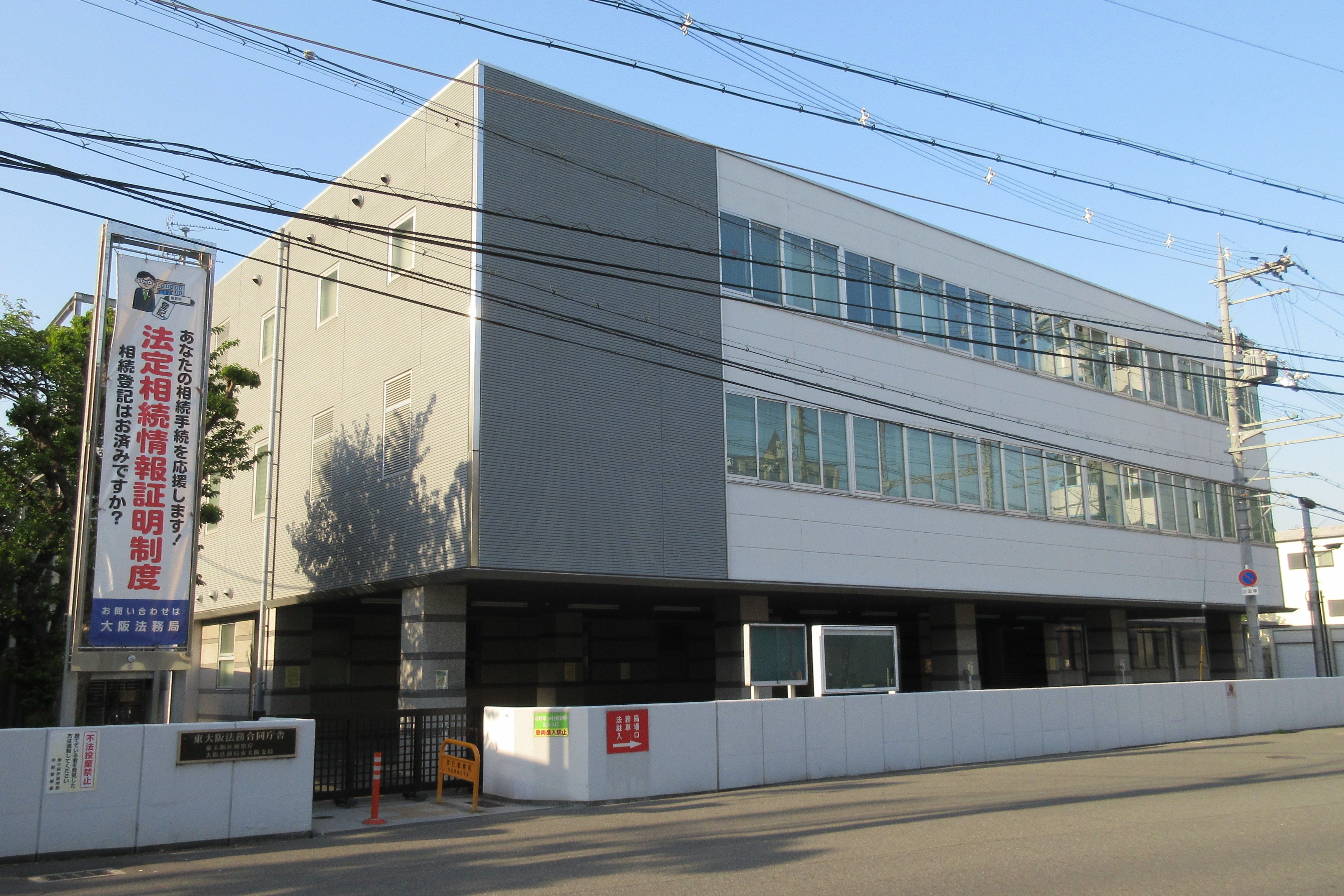 東大阪法務合同庁舎（東大阪区検察庁、大阪法務局東大阪支局）